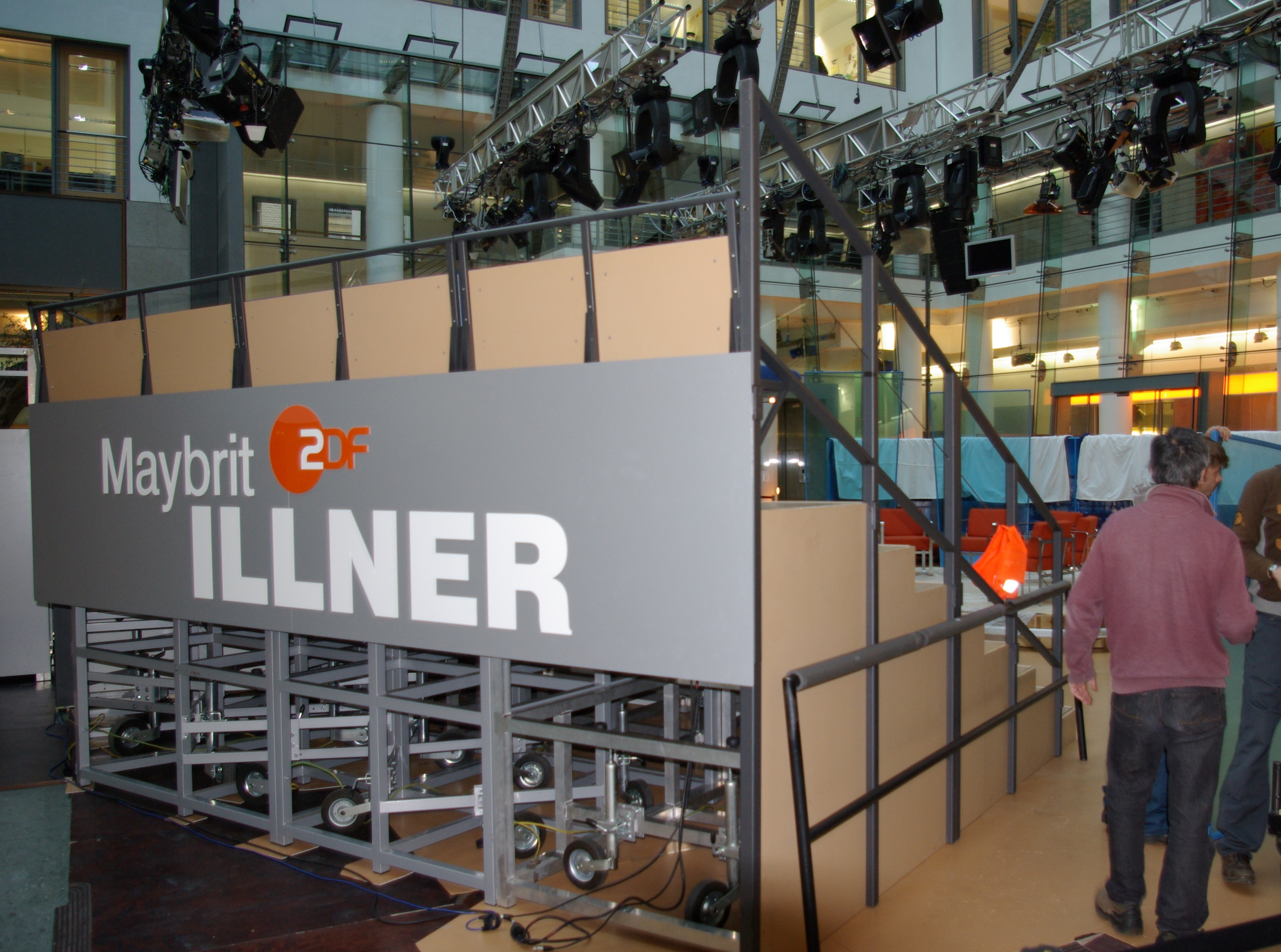 Studio der Fernsehsendung Maybrit Illner in Berlin